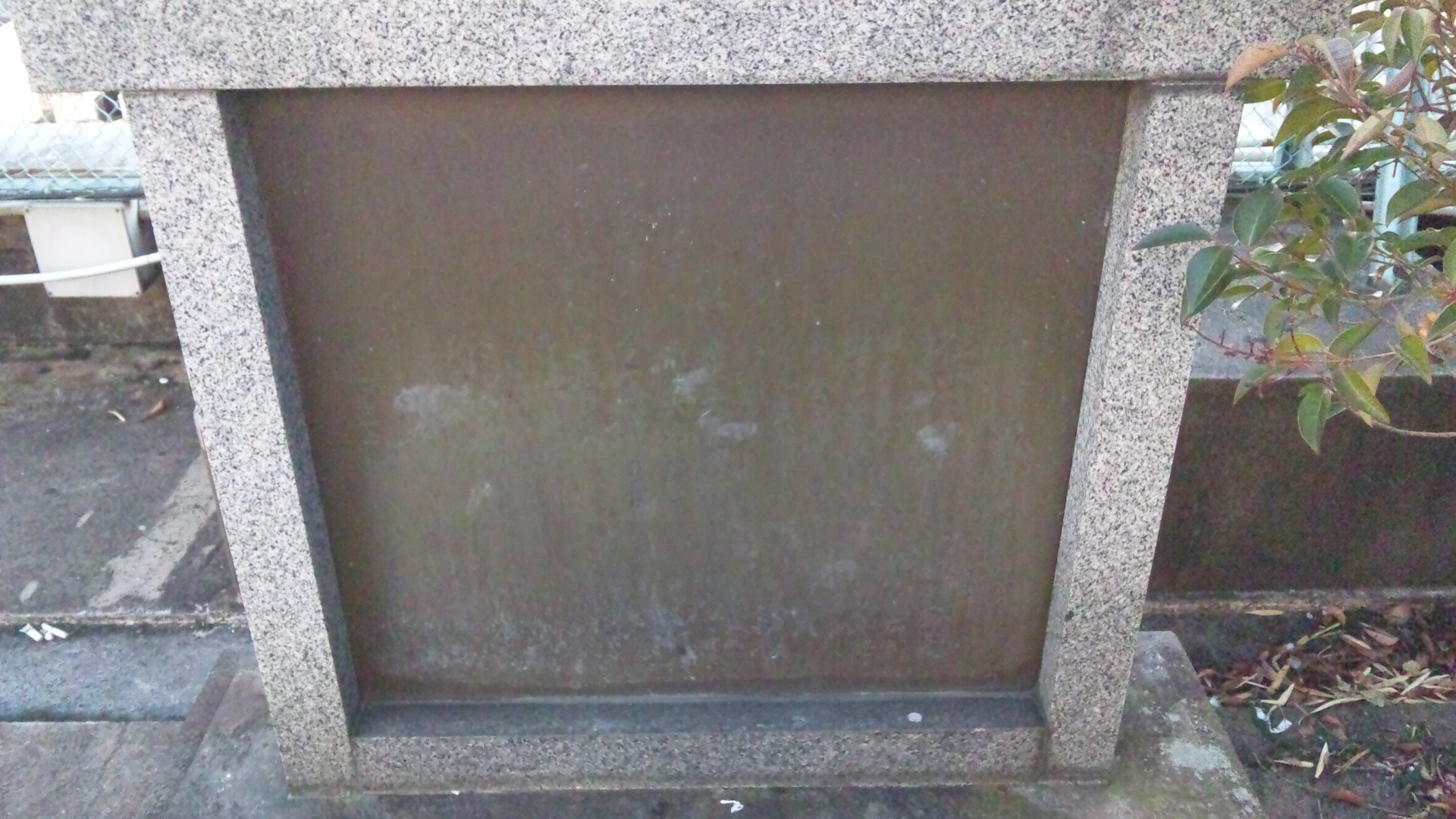 鏡ヶ池由緒板：栃木県宇都宮市馬場通り2－3－12 ラパーク長崎屋屋上